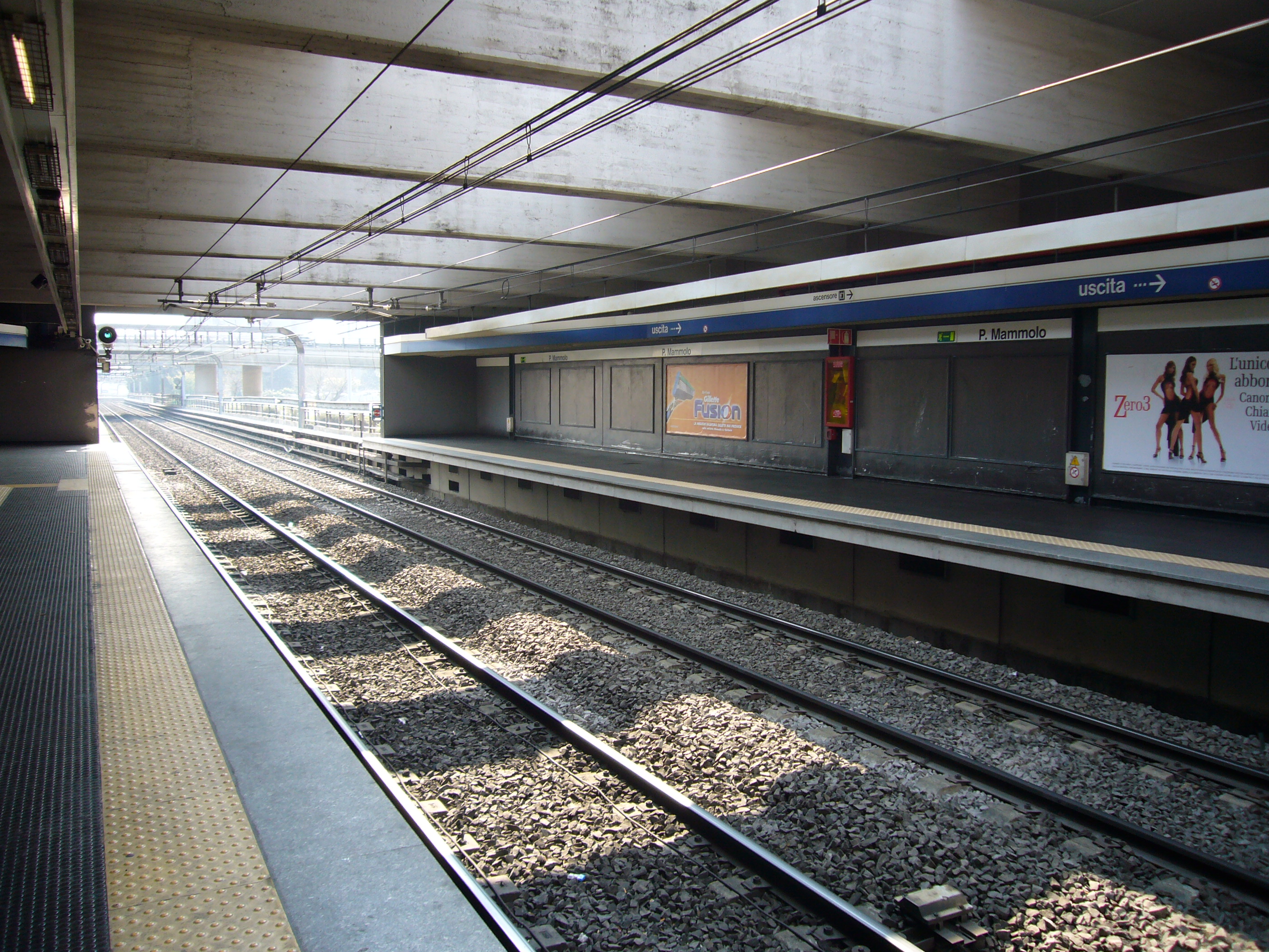 Metropolitana di Roma linea B: stazione Ponte Mammolo